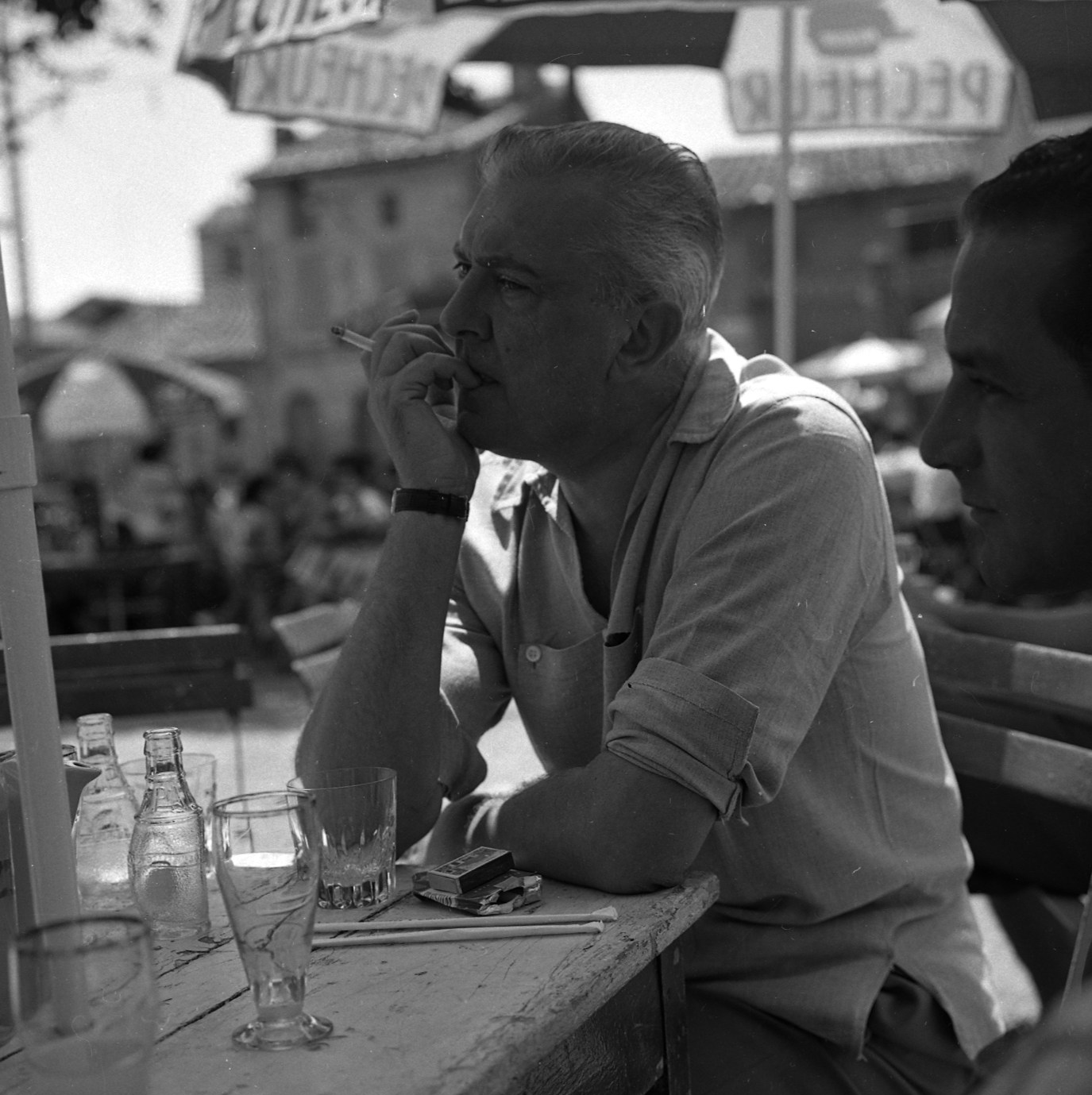 Noé (Haute-Garonne). 9 juillet 1961. Portrait du réalisateur Jacques Tati invité d'honneur de l'éléction de la "Belle Gaillarde", accoudé à une table, fumant une cigarette. Observation: "La Belle Gaillarde" est une éléction de miss qui a été créée à Noé (Haute-Garonne) durant l'été 1960 par Jacques Esterel, chansonnier et couturier, et Jean-Baptiste Doumeng, homme d'affaire et maire de Noé. L'élection de 1961 s'est déroulée du 8 au 10 juillet.